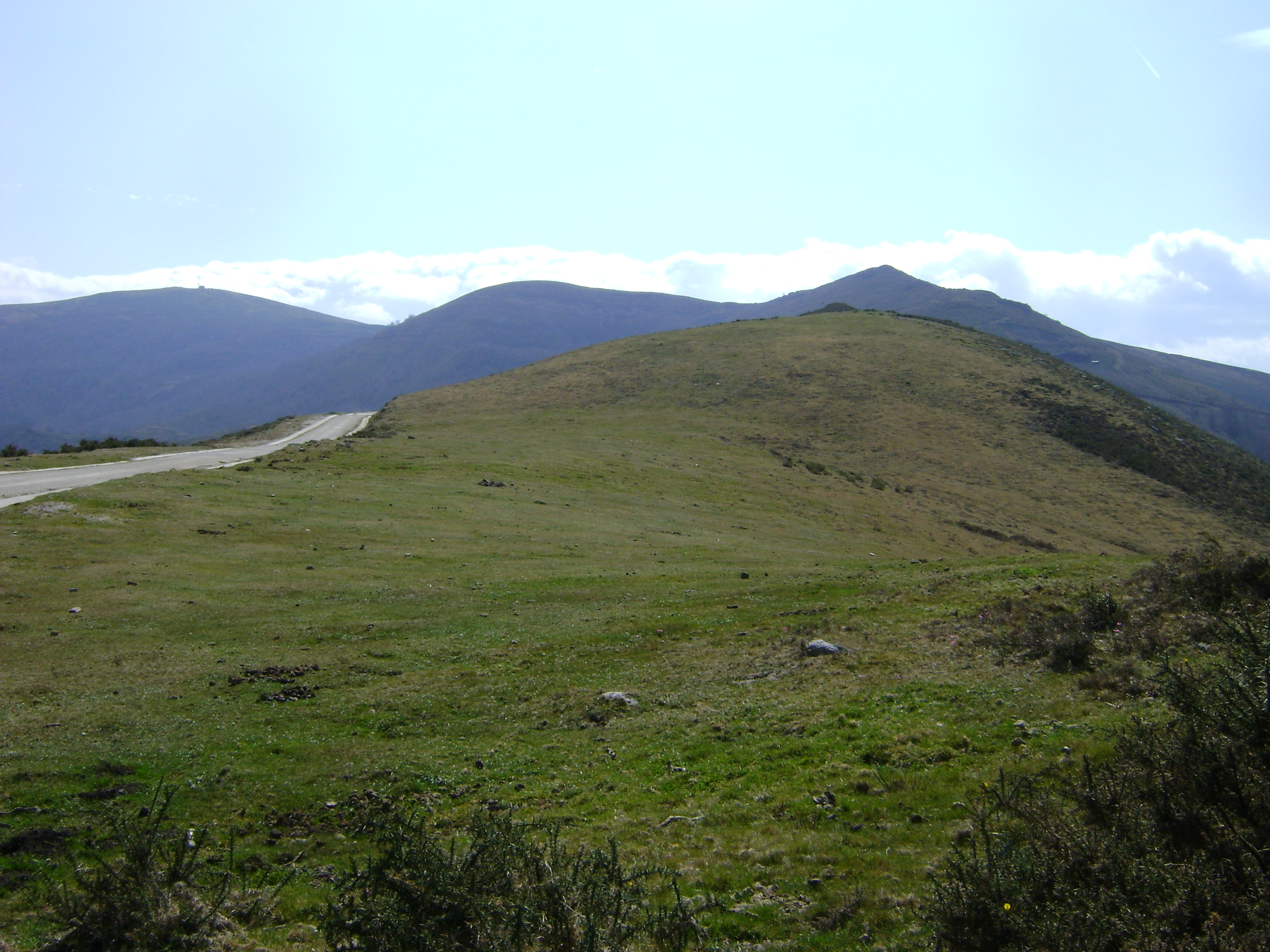 Explanada en la cima de la Perizuela